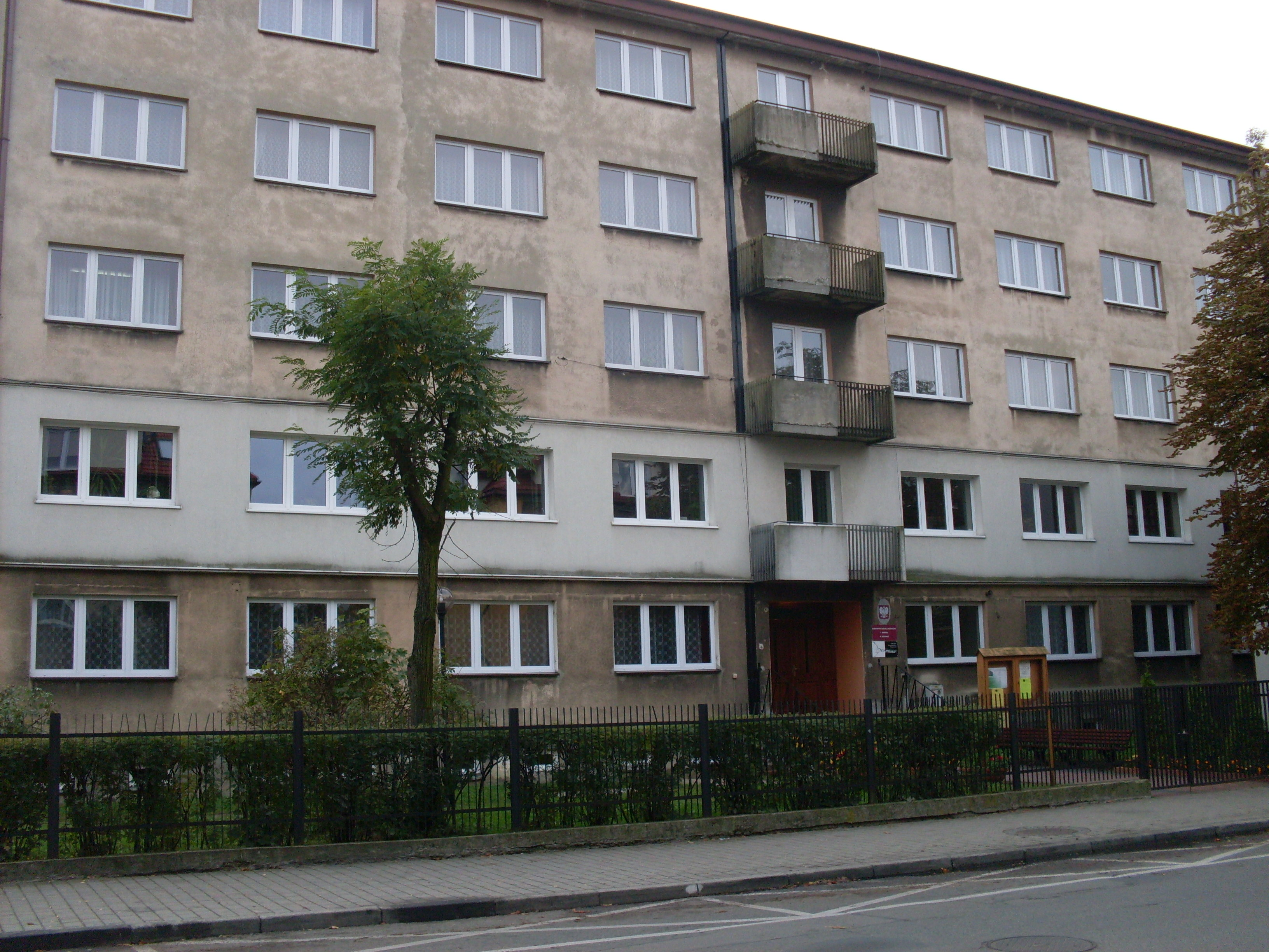 P.S.Muzyczna i Prokuratura Rej.Olkusz